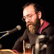 Erdogan Emir Live